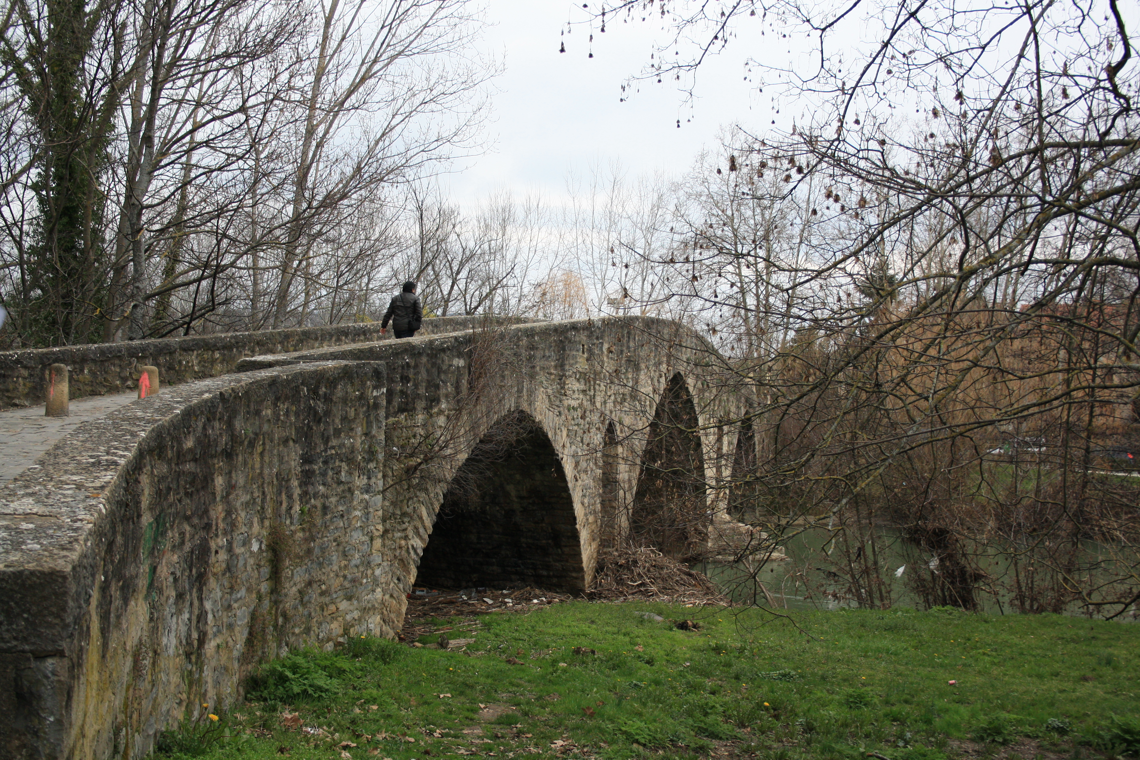 Puente de acceso a Pamplona